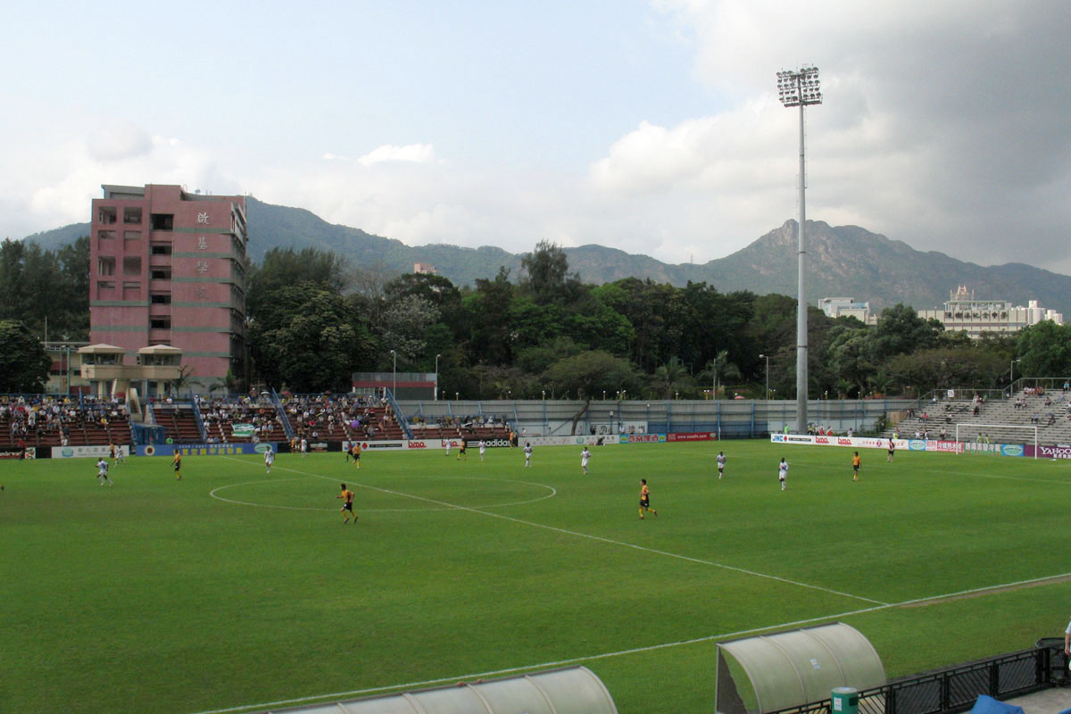 Mong Kok Stadium, Hong Kong